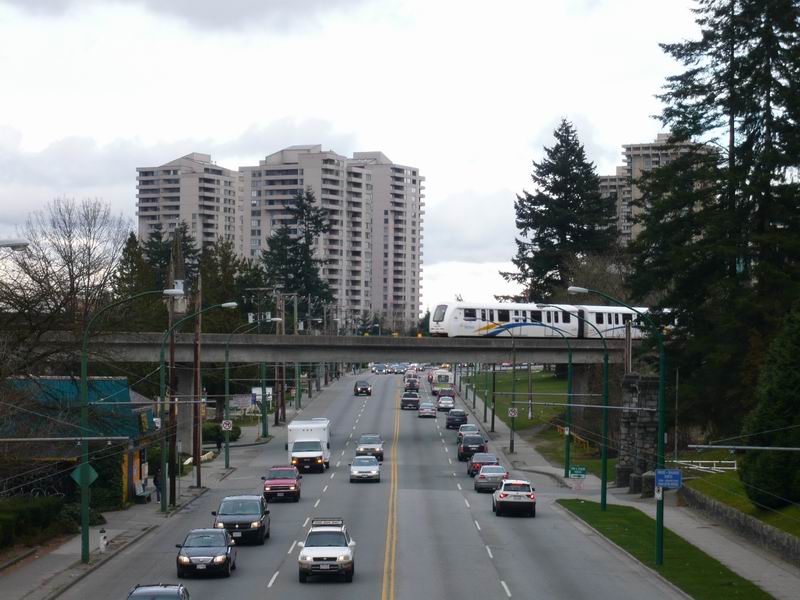 Kingsway BBy